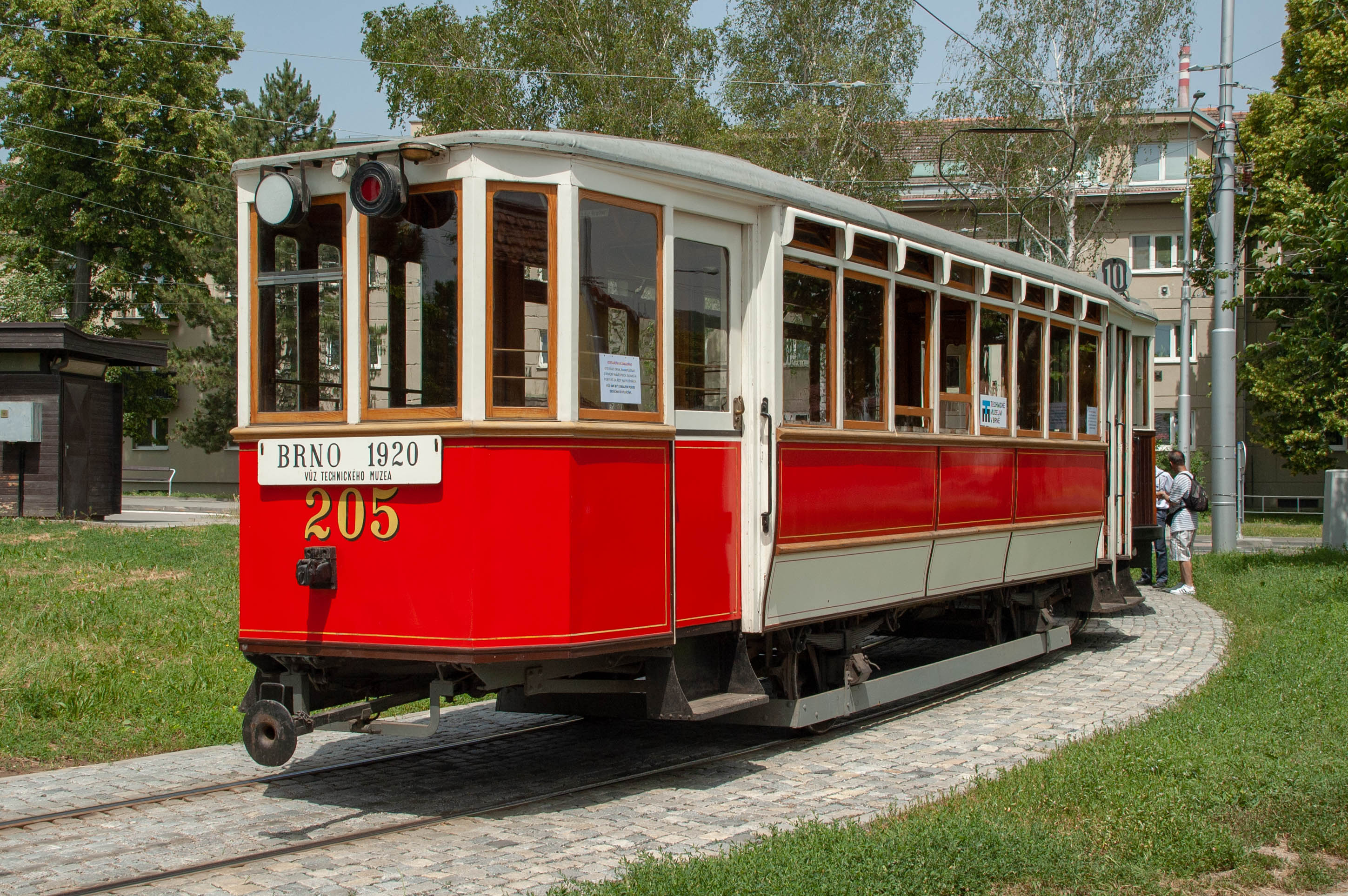 Dopravní nostalgie 2019 – vlek ev. č. 205